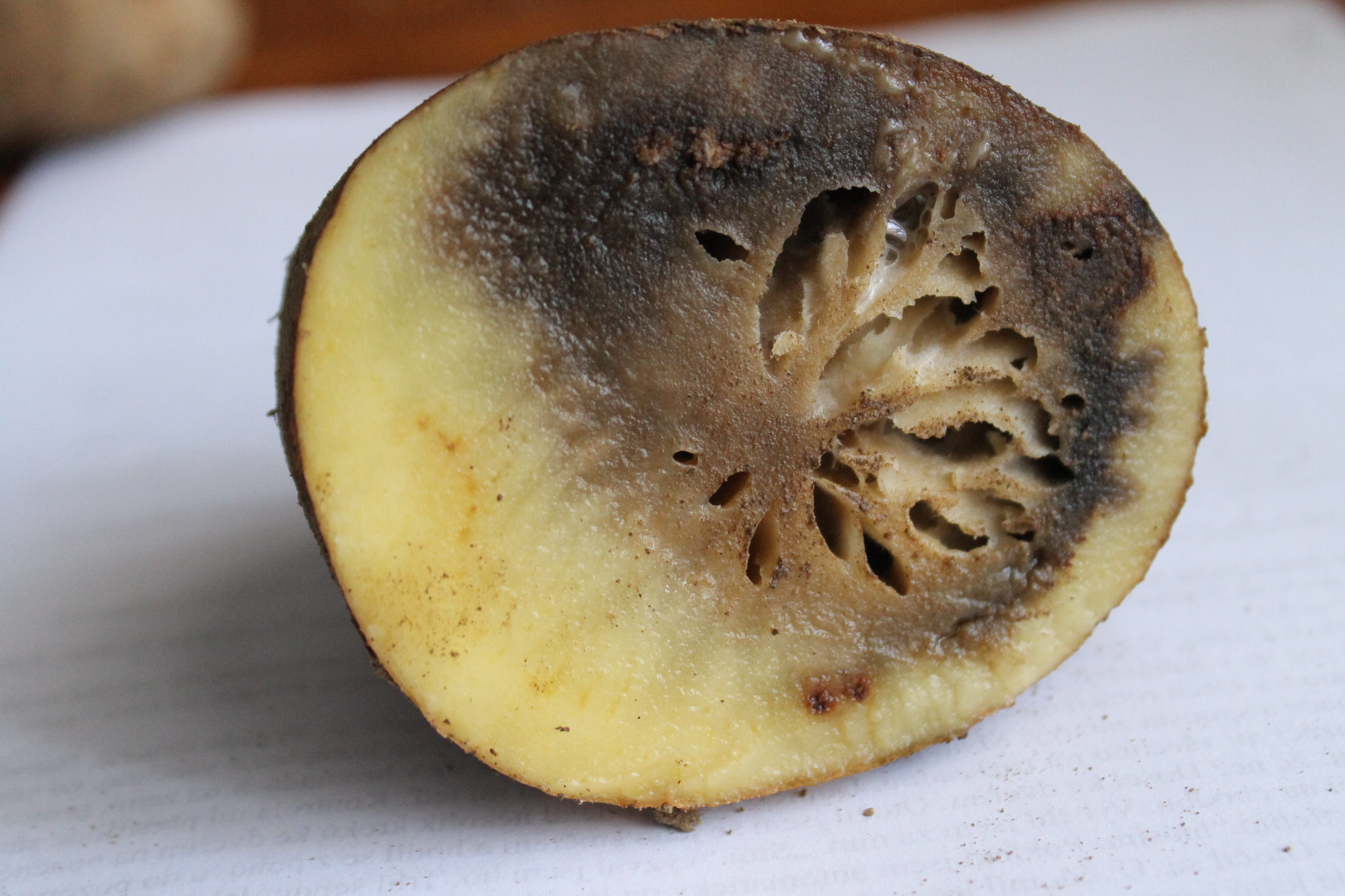 Phytophthora infestans